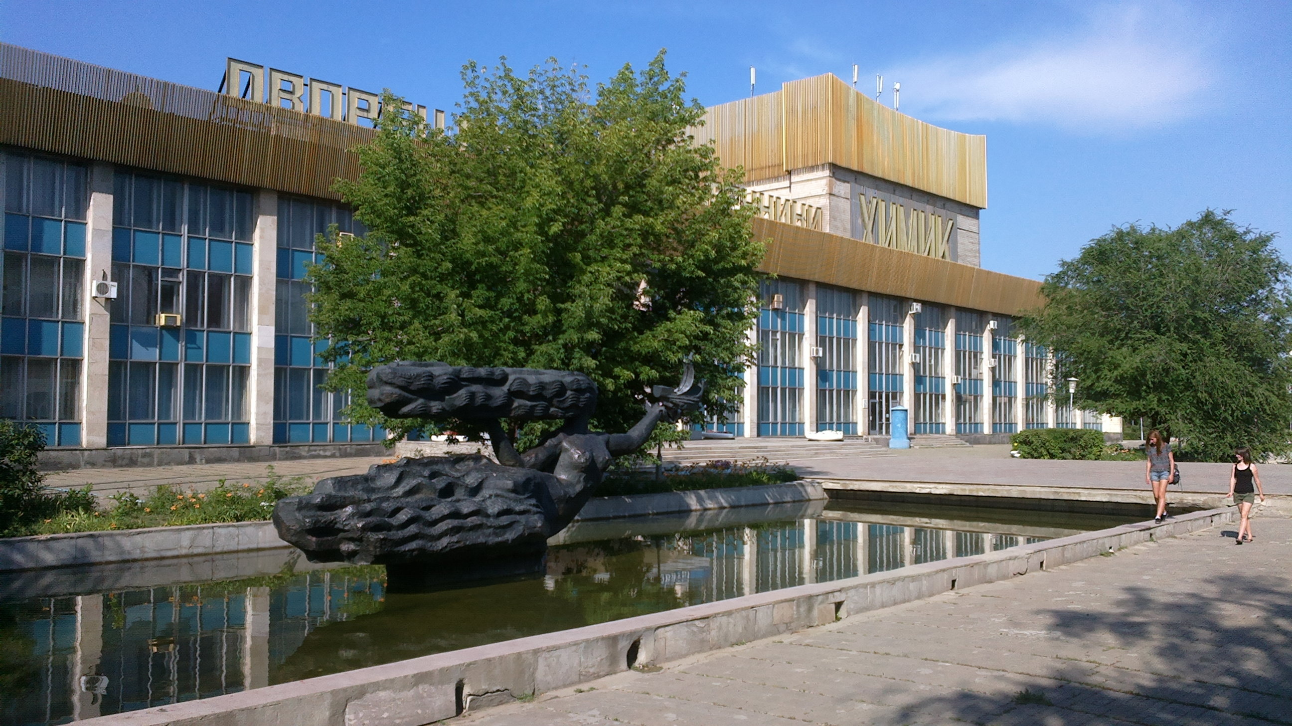 ДК «Химик» в Волгограде